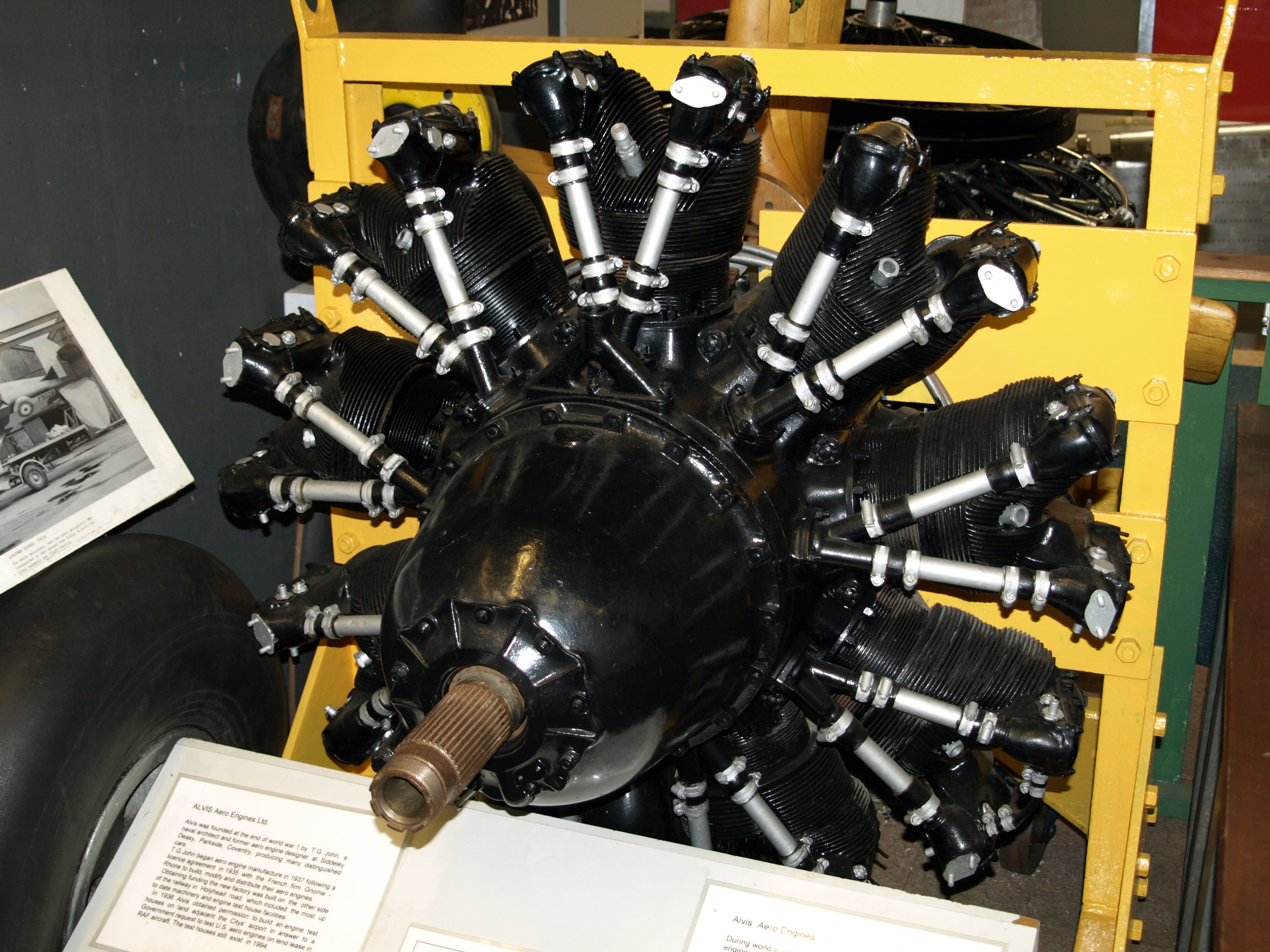 Alvis Leonides aircraft engine